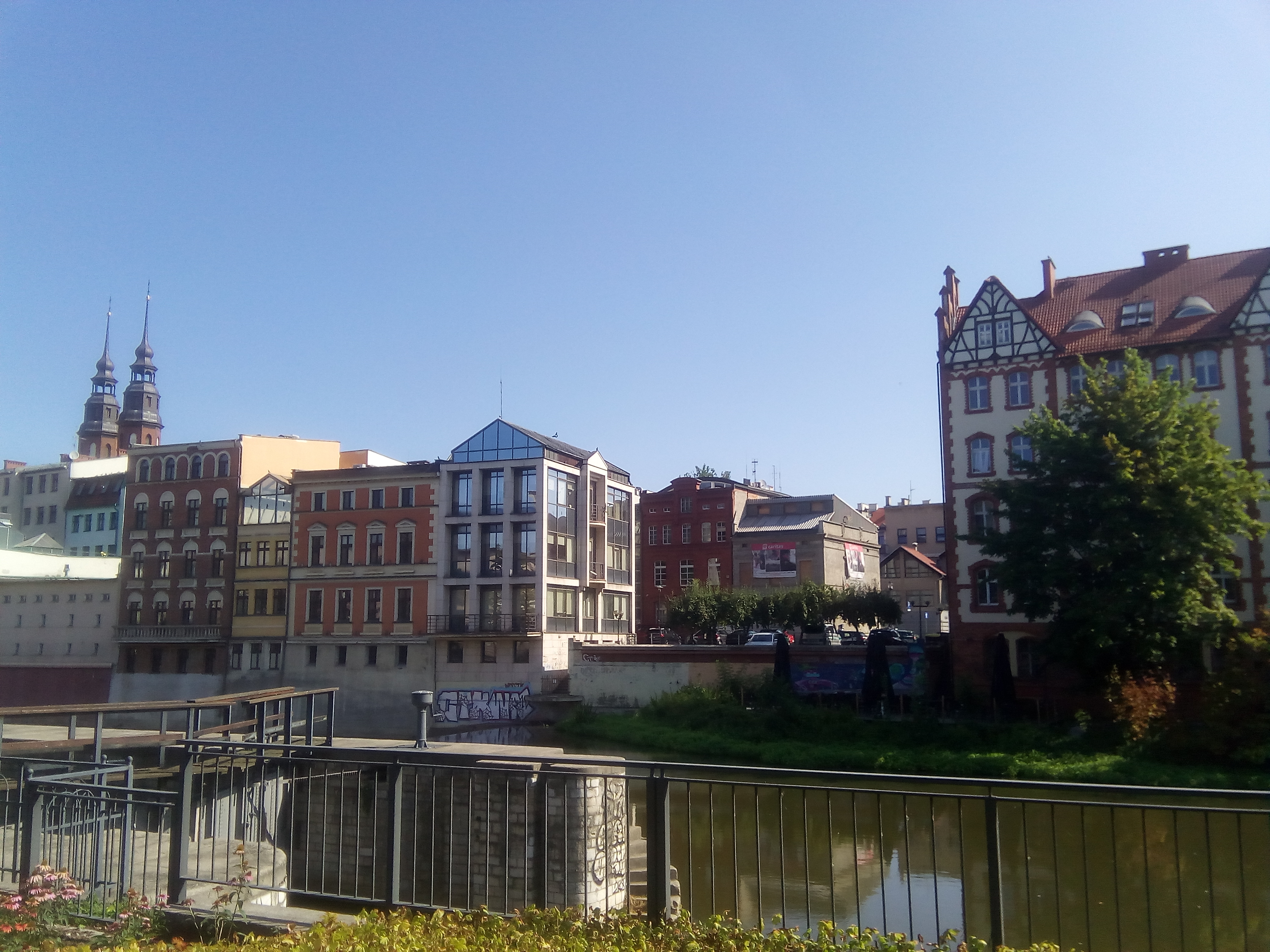 Opole, pohled na centrum města od řeky Odry